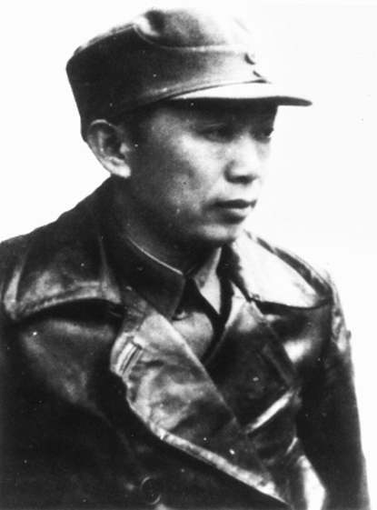 刘亚楼在解放战争时期